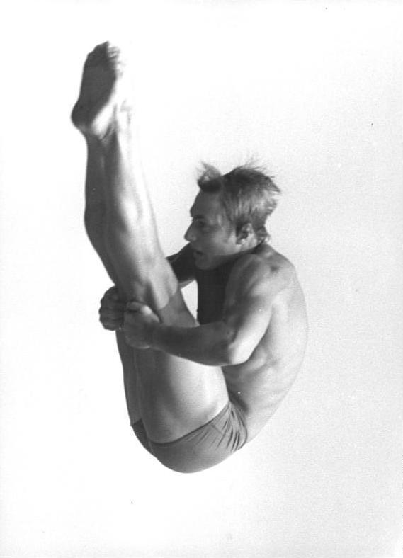 Falk Hoffmann ADN-ZB Mittelstädt 16.6.78-str- Leipzig: DDR-Meisterschaften im Wasserspringen- Europameister Falk Hoffmann aus Halle setzte sich als Favorit am zweiten Tag der DDR-Titelkämpfe im Kunstspringen der Herren durch. Der 26jährige Sportstudent erkämpfte mit diesem Sieg seinen 123. DDR-Meistertitel.